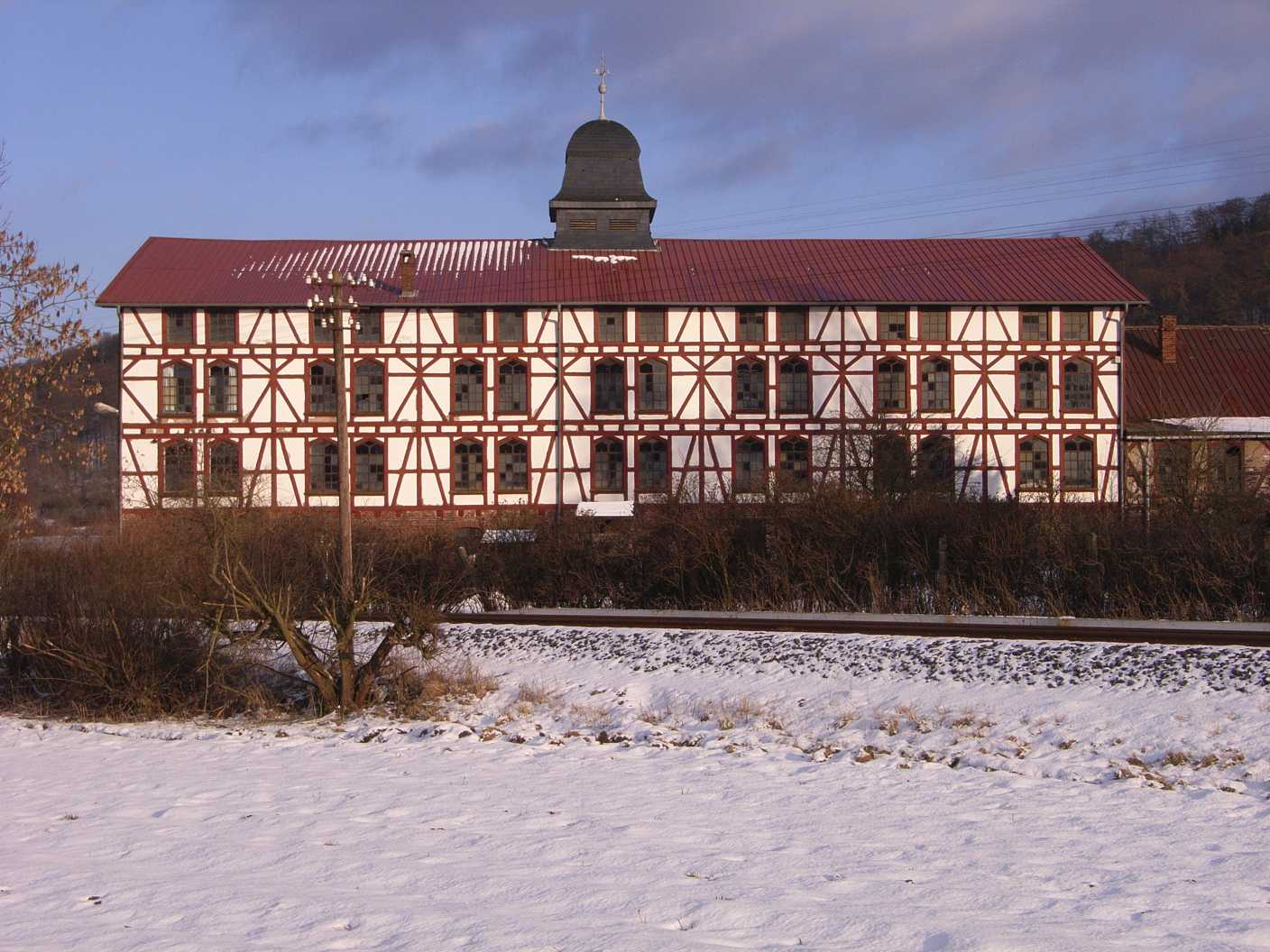 Carlshütte, Buchenau (Dautphetal, Hessen)